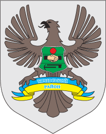 Герб Тячівського району